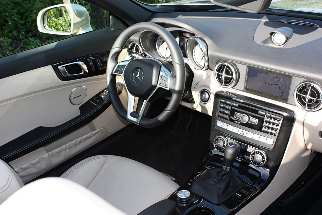 Mercedes-Benz SLK 250 BlueEFFICIENCY (R 172)